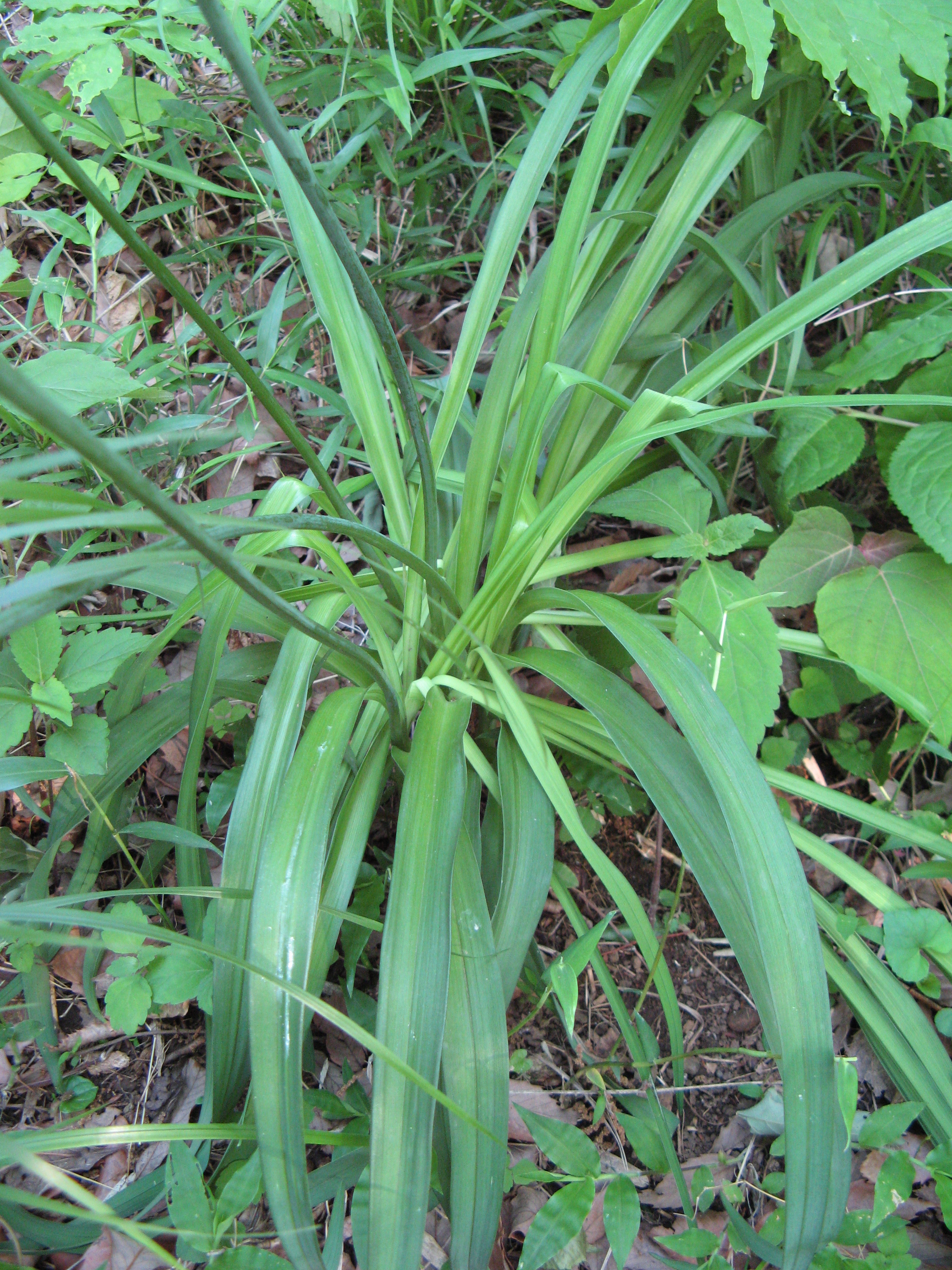 Hemerocallis middendorfii var. esculenta f. musashiensis(Mt. Sengen)